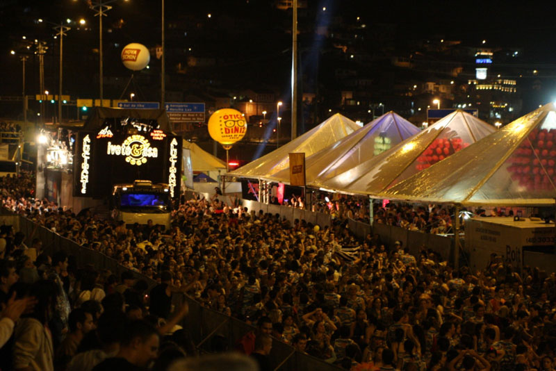 Folianópolis 2007 - Asa de Águia